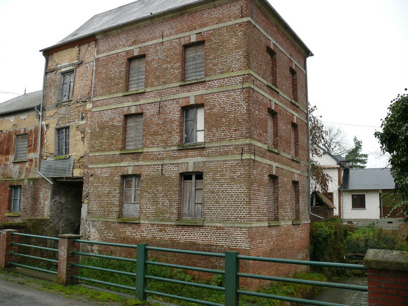 Croissy-sur-Celle : l'ancien Moulin aux moines en 2006